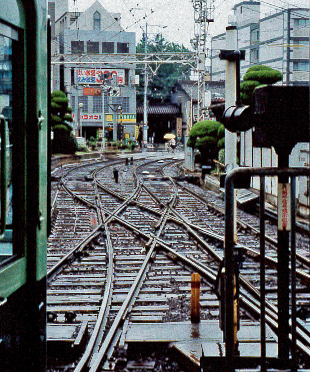 京津線・京阪三条駅から道路方面を望む（1997年7月撮影）